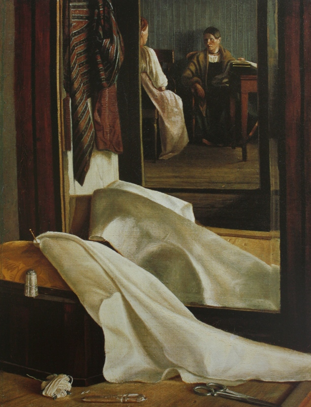 Неизвестный художник школы Венецианова — Сорока Григорий (?) «Отражение в зеркале» Холст, масло 41,3х38,5 Государственный Русский музей